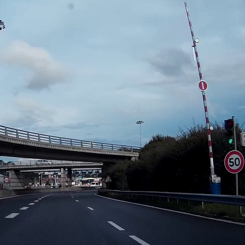 Panneaux routiers français XK3 B1 B14 et R22.